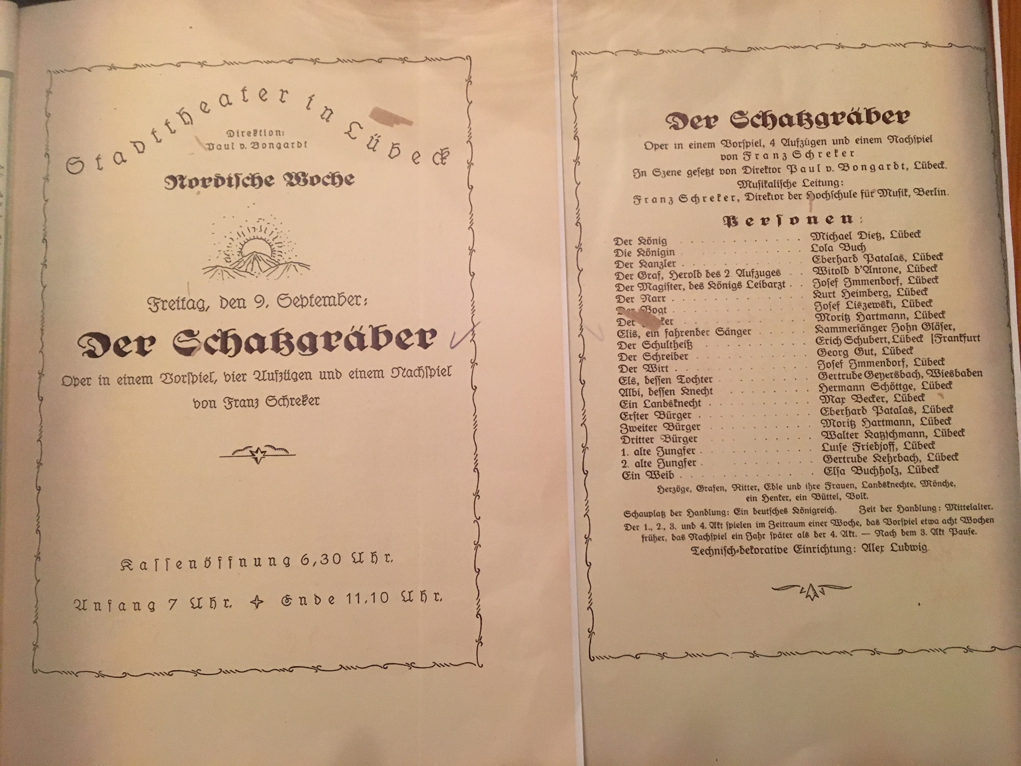 Theaterprogramm